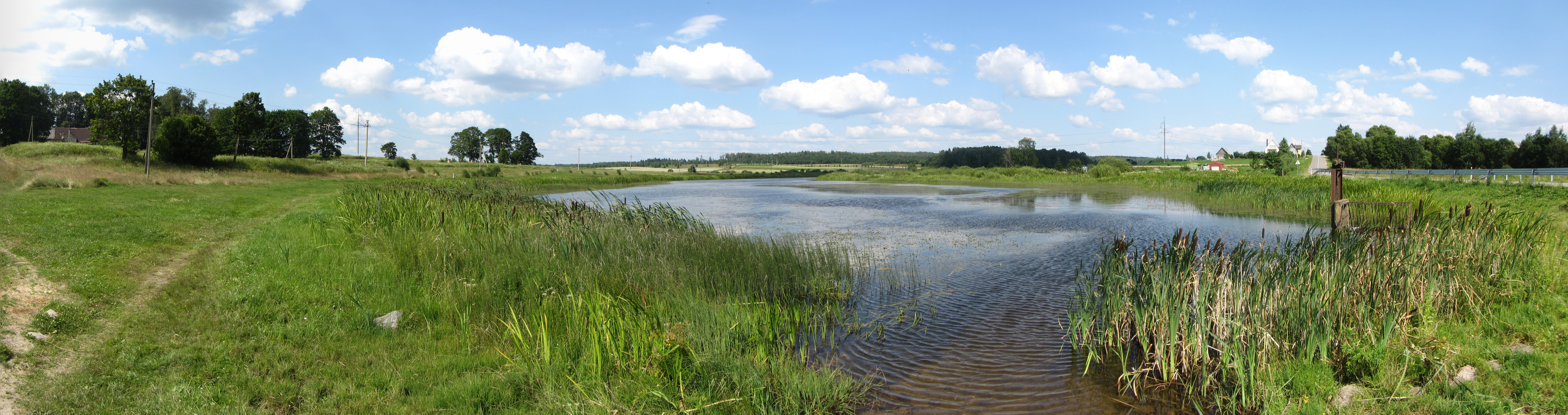 Rakonys, Lithuania